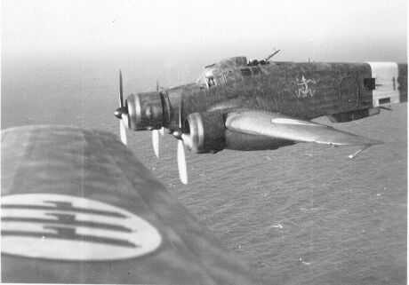 Fotografia scattata da Andrea Nicola, osservatore-fotografo della Regia Aeronautica nel periodo 1940/1942. Di tale fotografia ne conservo l'originale. --Elwood 00:40, 14 dic 2005 (CET)